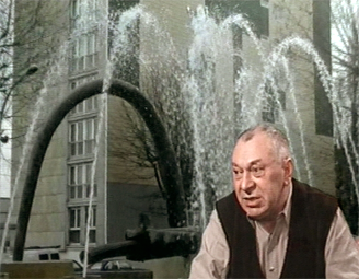 Portrait de Victor Roman